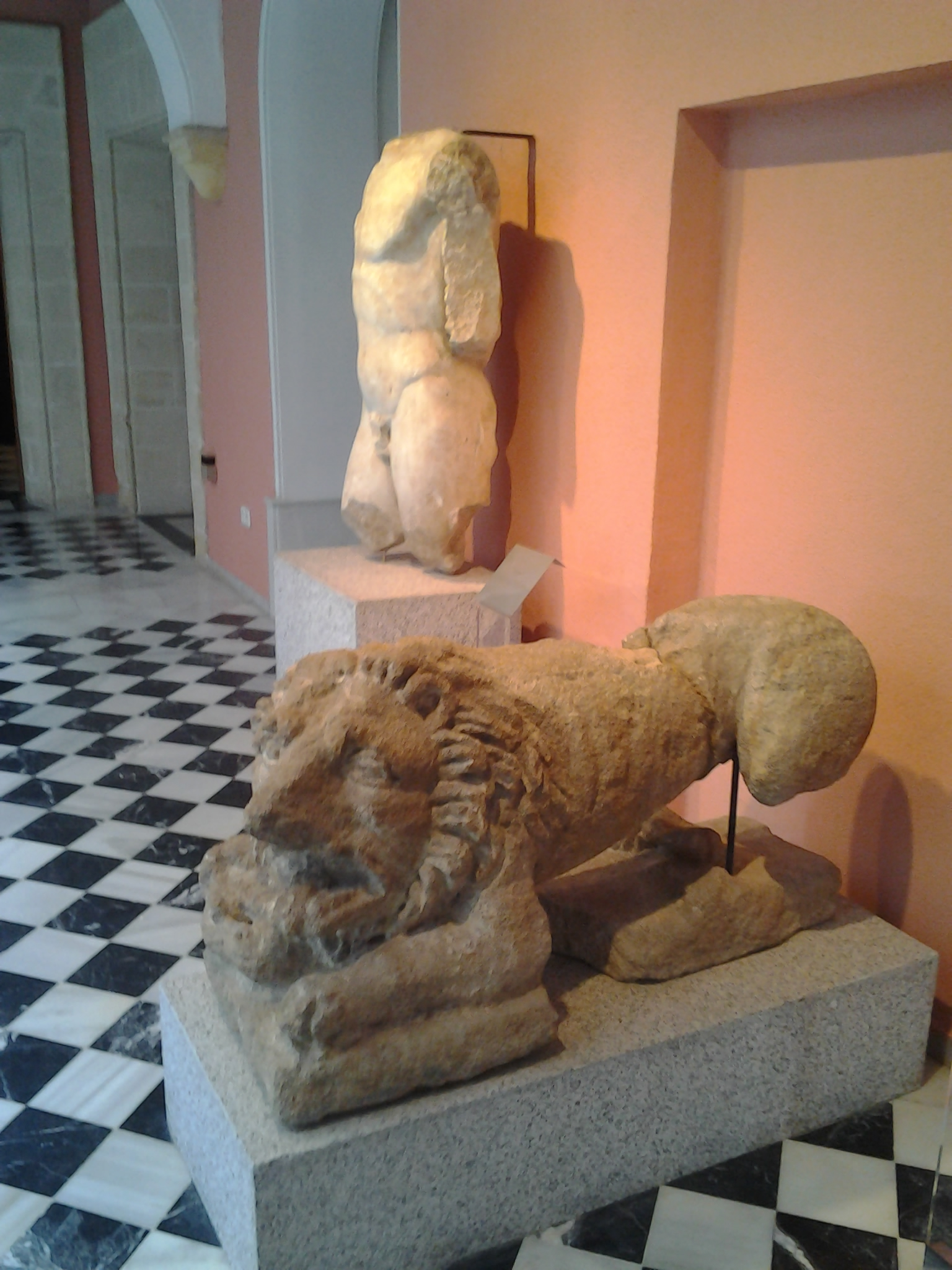 Museo Arqueológico de Jerez de la Frontera, Cádiz. Estatua romana de un torsomasculino e iberorromana de un león procedente de Asta Regia.